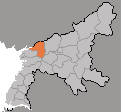 Map of Anju, Pyongan-namdo, DPRK, 2006